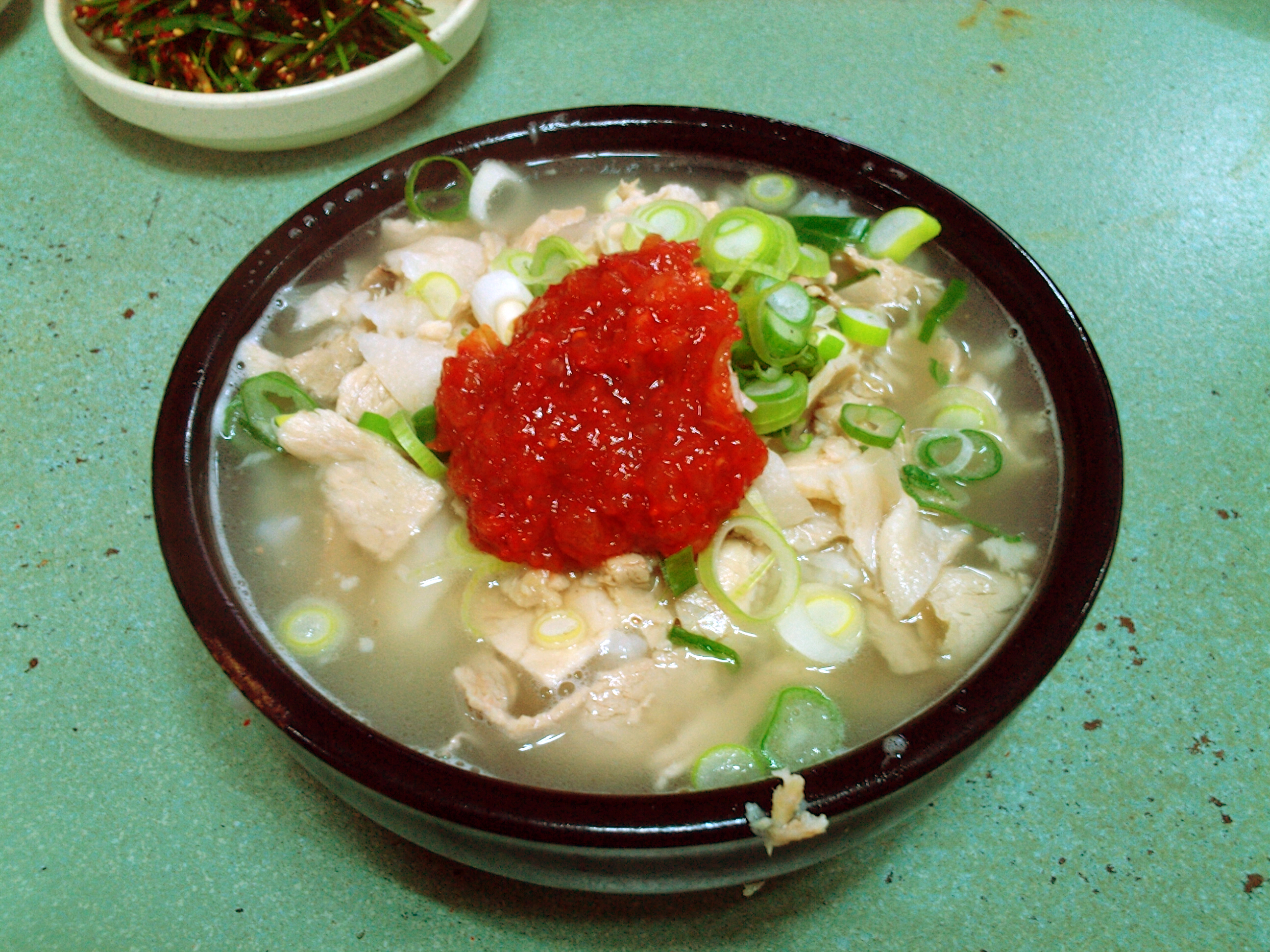 맛있는 돼지국밥이다